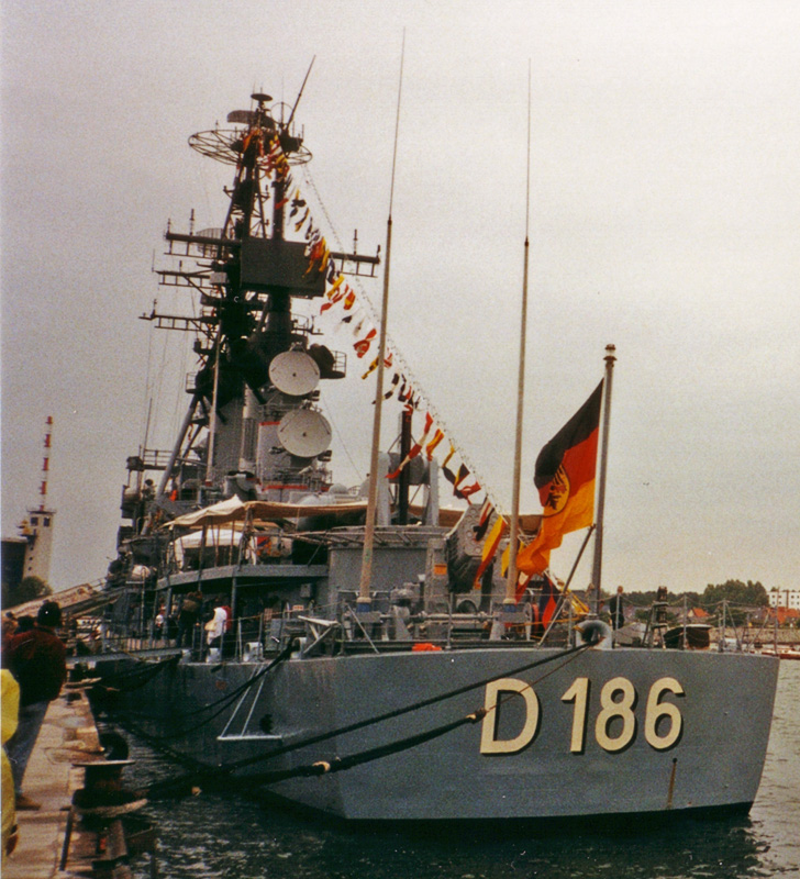 Beschreibung: Zerstörer D186 Mölders